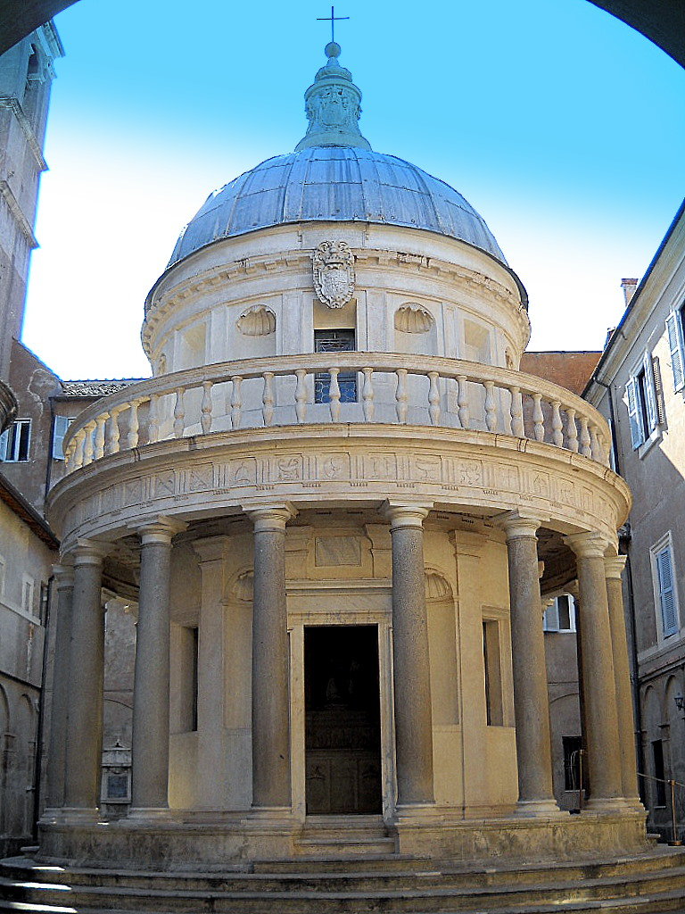 Tempietto del Bramante all'interno do San Pietro in Montorio sul colle Gianicolo di Roma.